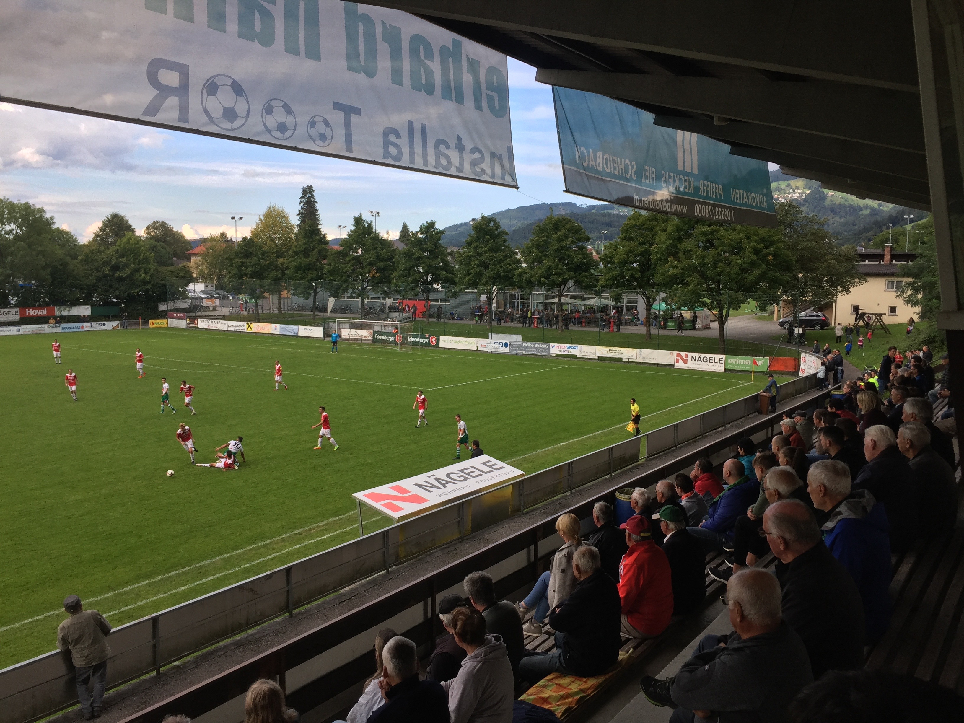 Das Gastrastadion, Heimstätte des FC RW Rankweil, in Rankweil; Blick von der Haupttribüne auf das Spielfeld und das Clubheim